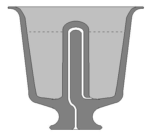 Dwarsdoorsnede van de beker der rechtvaardigheid.